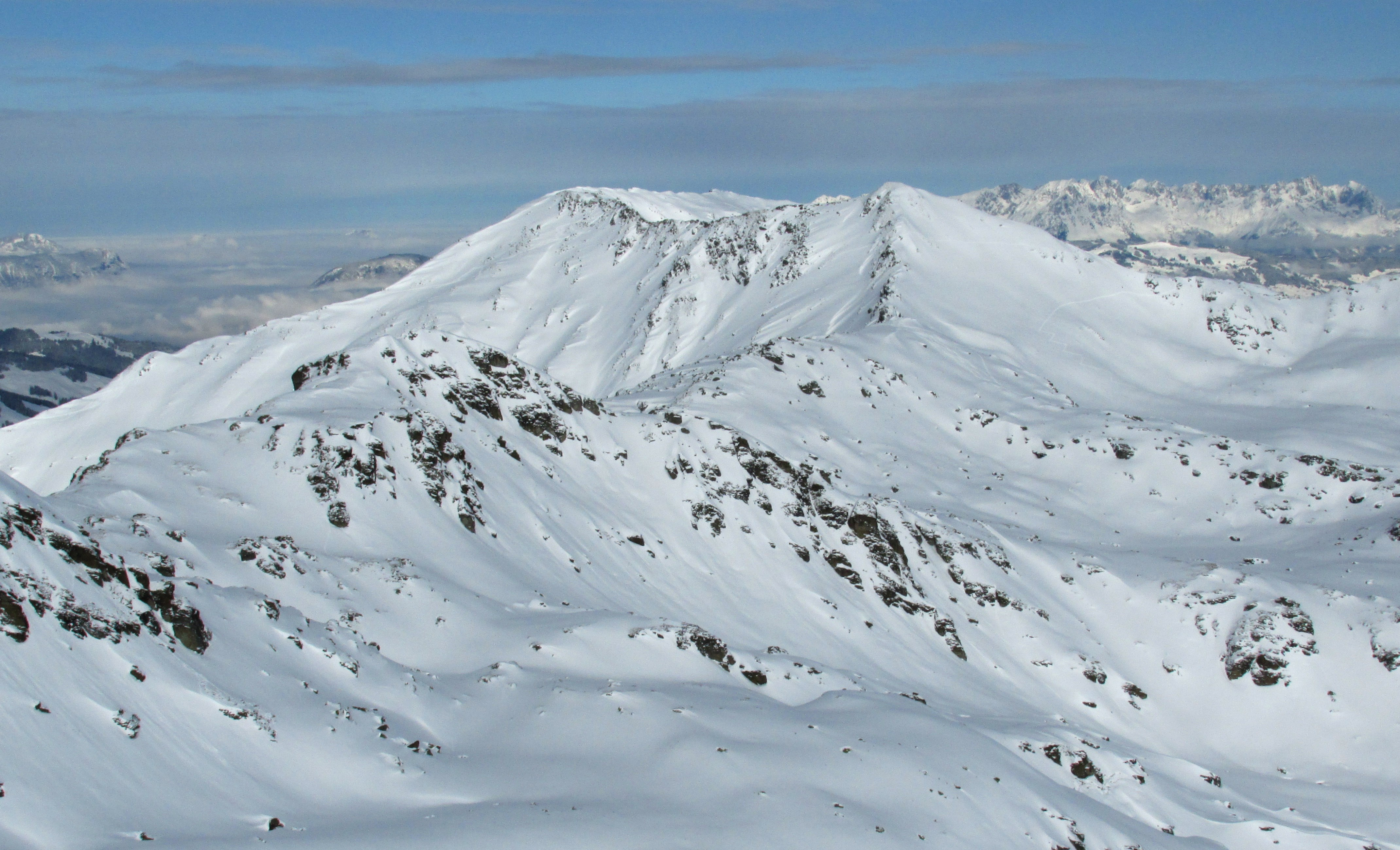 Schafsiedel links und Aleitenspitze rechts fotografiert vom Salzachgeier. Die unscheinbare Erhebung am Grad Richtung Aleitenspitze, im Bild zwischen Schafsiedel und Aleitenspitze ist der Schwebenkopf.